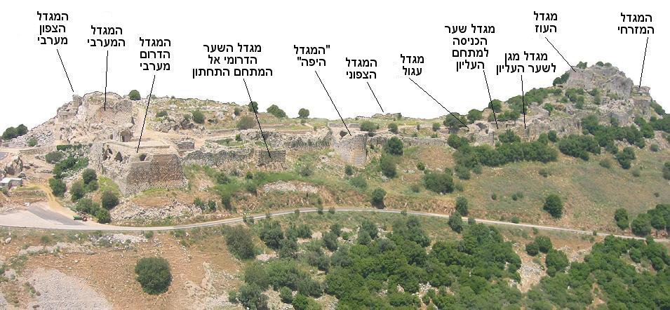 מבצר נמרוד